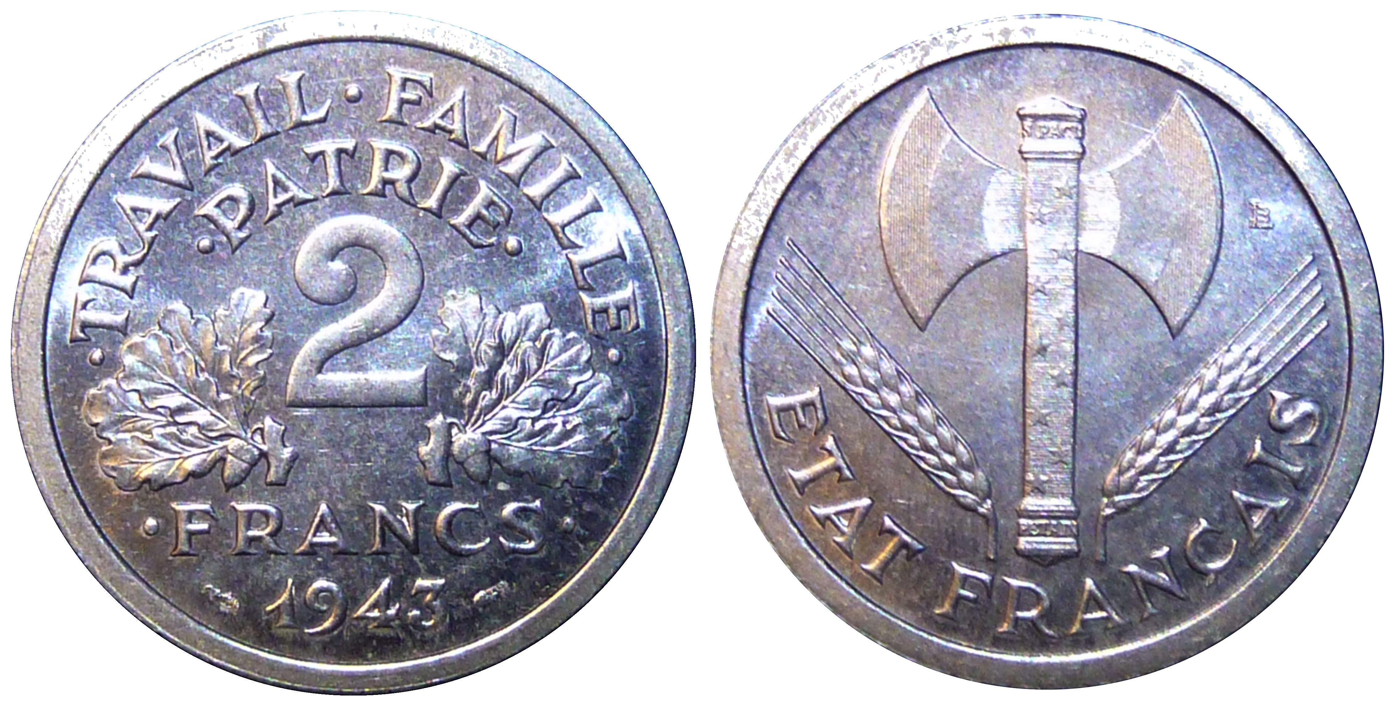 2 francs en aluminium émise en 1943 par l’État Français. Graveur Lucien Bazor. Diamètre 27 mm poids 2,2 g. Atelier de Paris : 106 997 500 exemplaires.